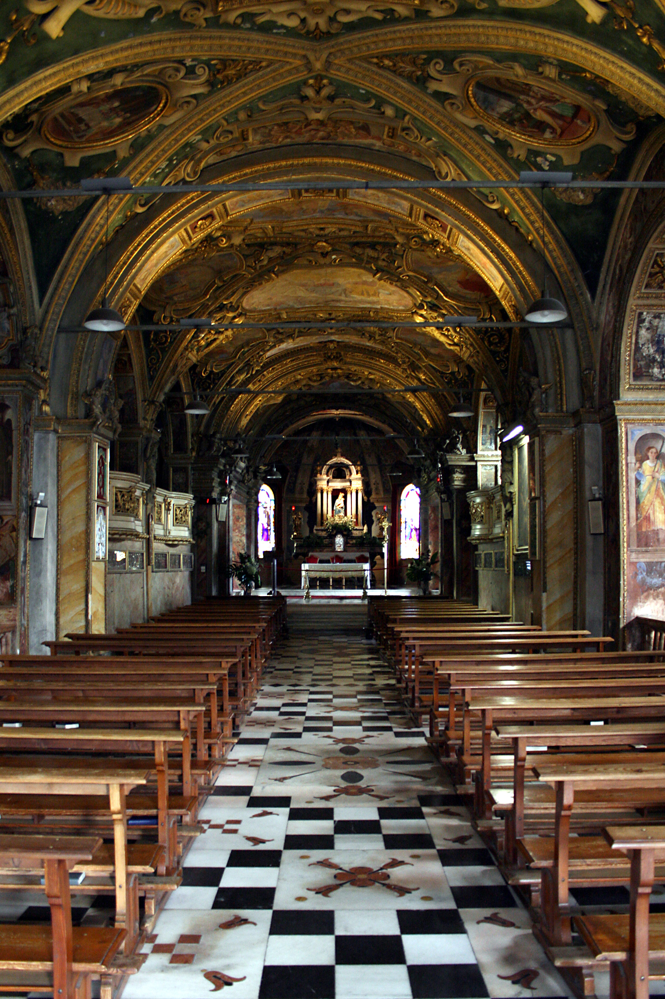 Madonna del Sasso, Orselina, Switzerland